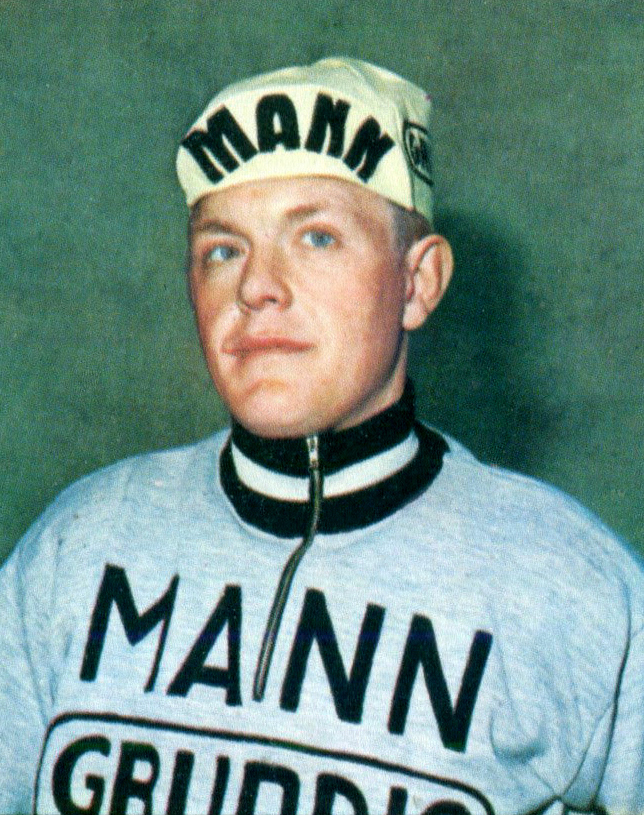 Figurina/Sticker CAMPIONI DELLO SPORT 1968/69 - n. 185 - VAN NESTE -BEL